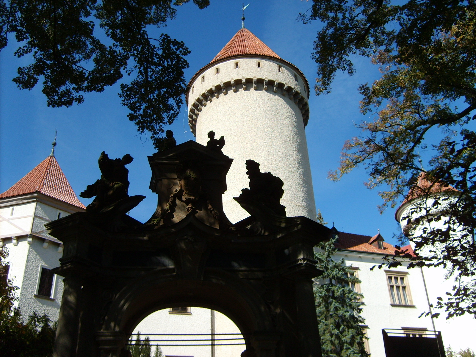 Chateau of Konopiště, near Benešov, Czech r.